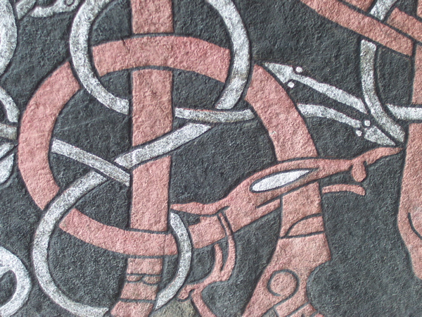 Upplands Runinskrift 871